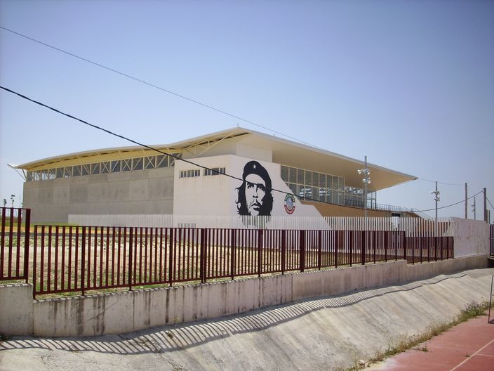 Sala de deportes de Marinaleda con el Che pintado.